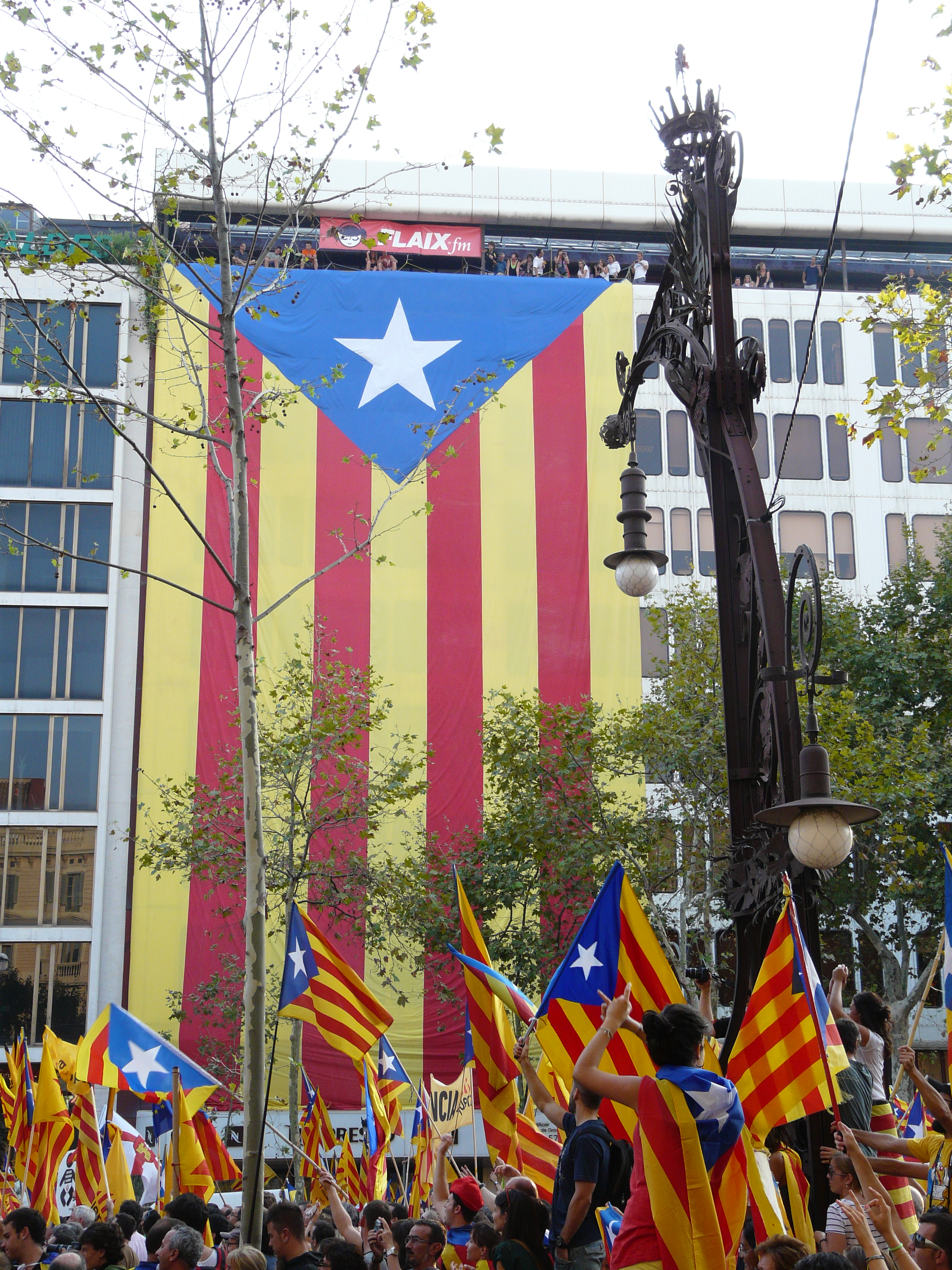 Fanals-Banc (Barcelona). Object location41° 23′ 24.77″ N, 2° 10′ 01.76″ E